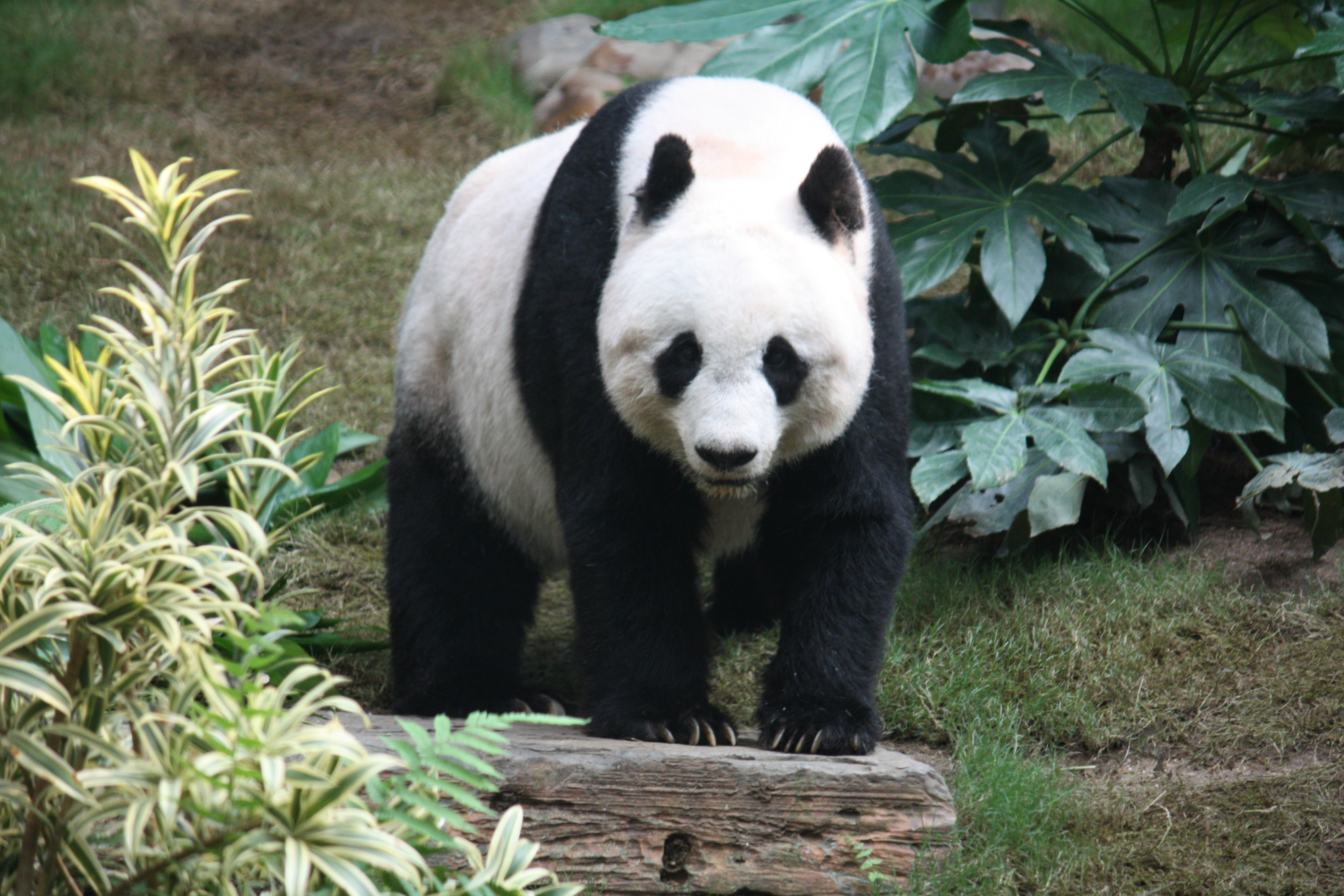 Großer Panda im Ocean Park, Hongkong